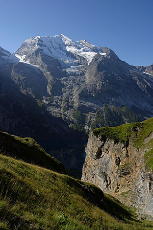 Doldenhorn